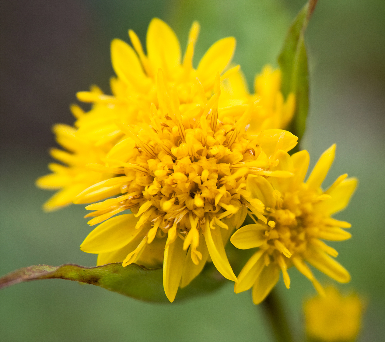 ミヤマアキノキリンソウ (学名:Solidago virgaurea var. leiocarpa)